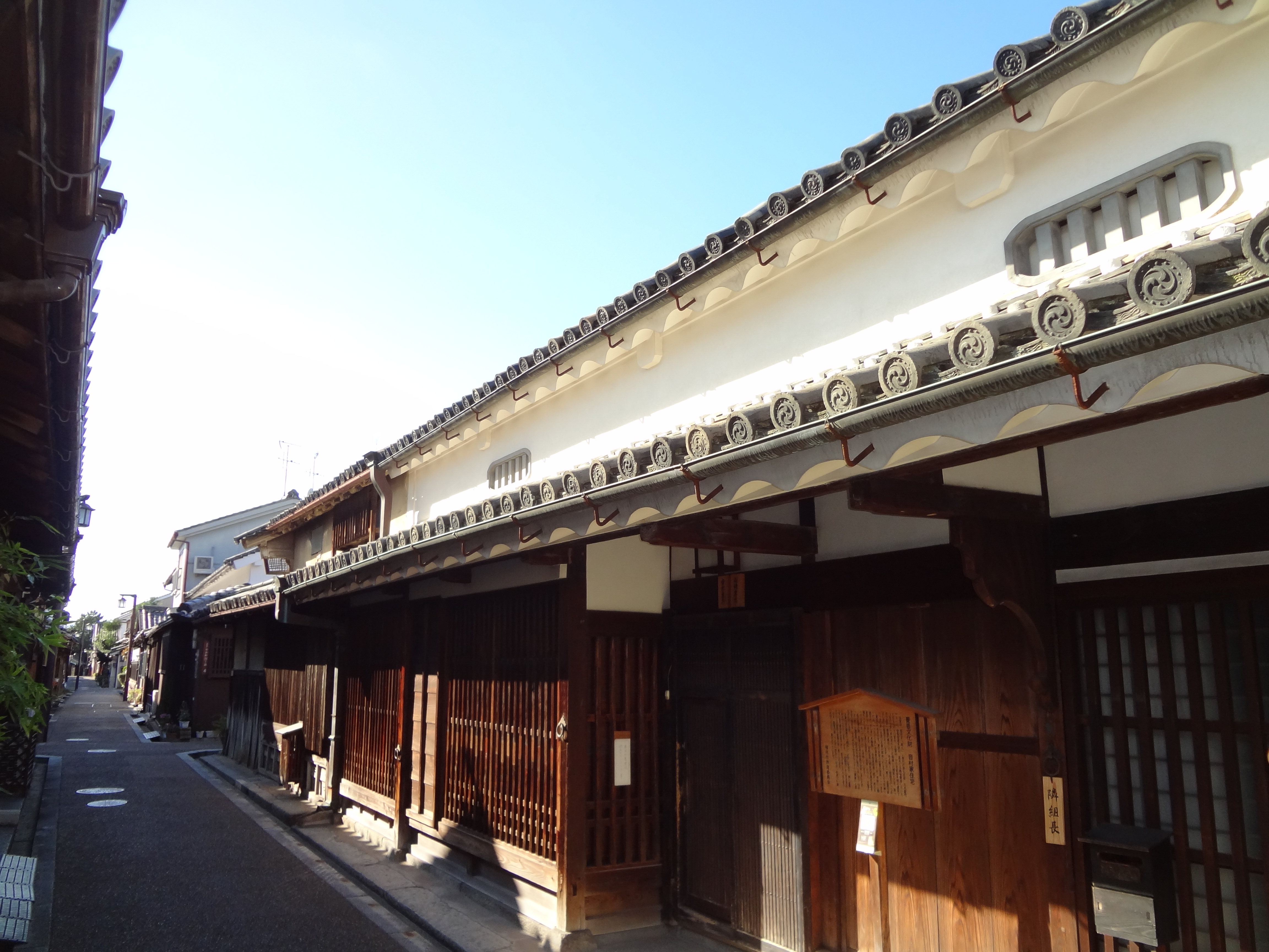 細九といい、かつては金物問屋を営んでいた。